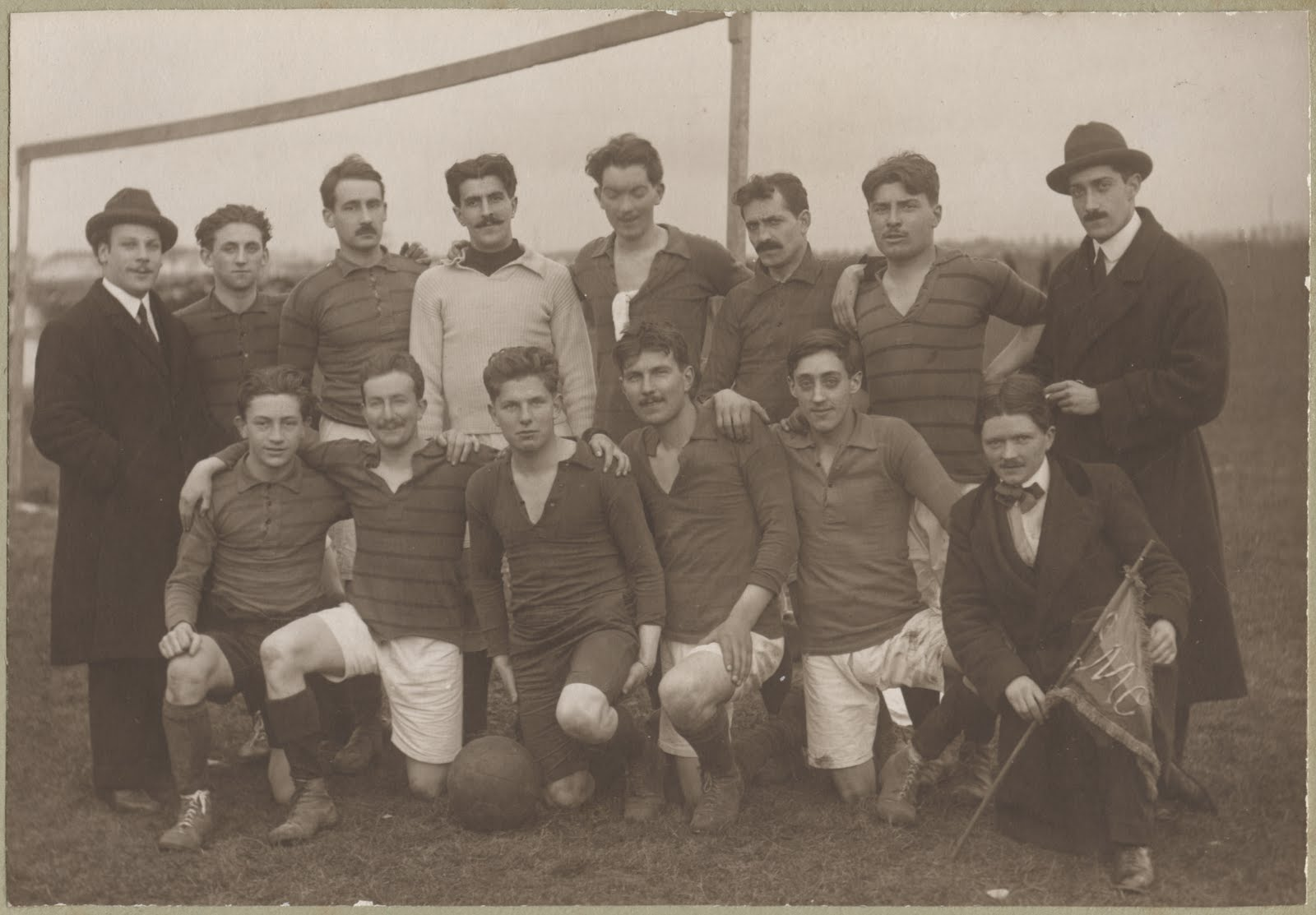 Photo de groupe du SM Caen, en 1918-1919. Debouts : Burnier, Leboucher, Bouleis, Theas, Fouques, Marchhal, Girard, Victor, Mullois (dirigeant). A genoux : Jean Gast, Dubourg, Lesomptier, Pieplu, Lenoir, Lelandais (dirigeant).